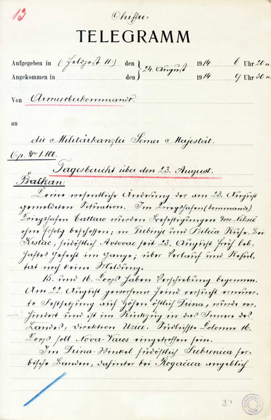 Chiffre Telegramm von 1914 (Kaiserberichte)